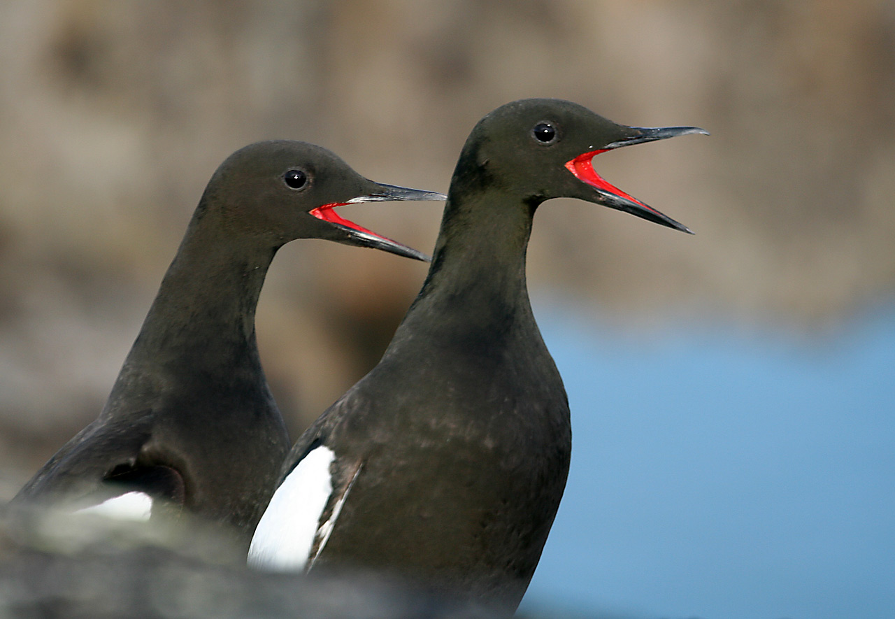 Gryllteise (Cepphus grylle) auf Spitzbergen (Svalbard)